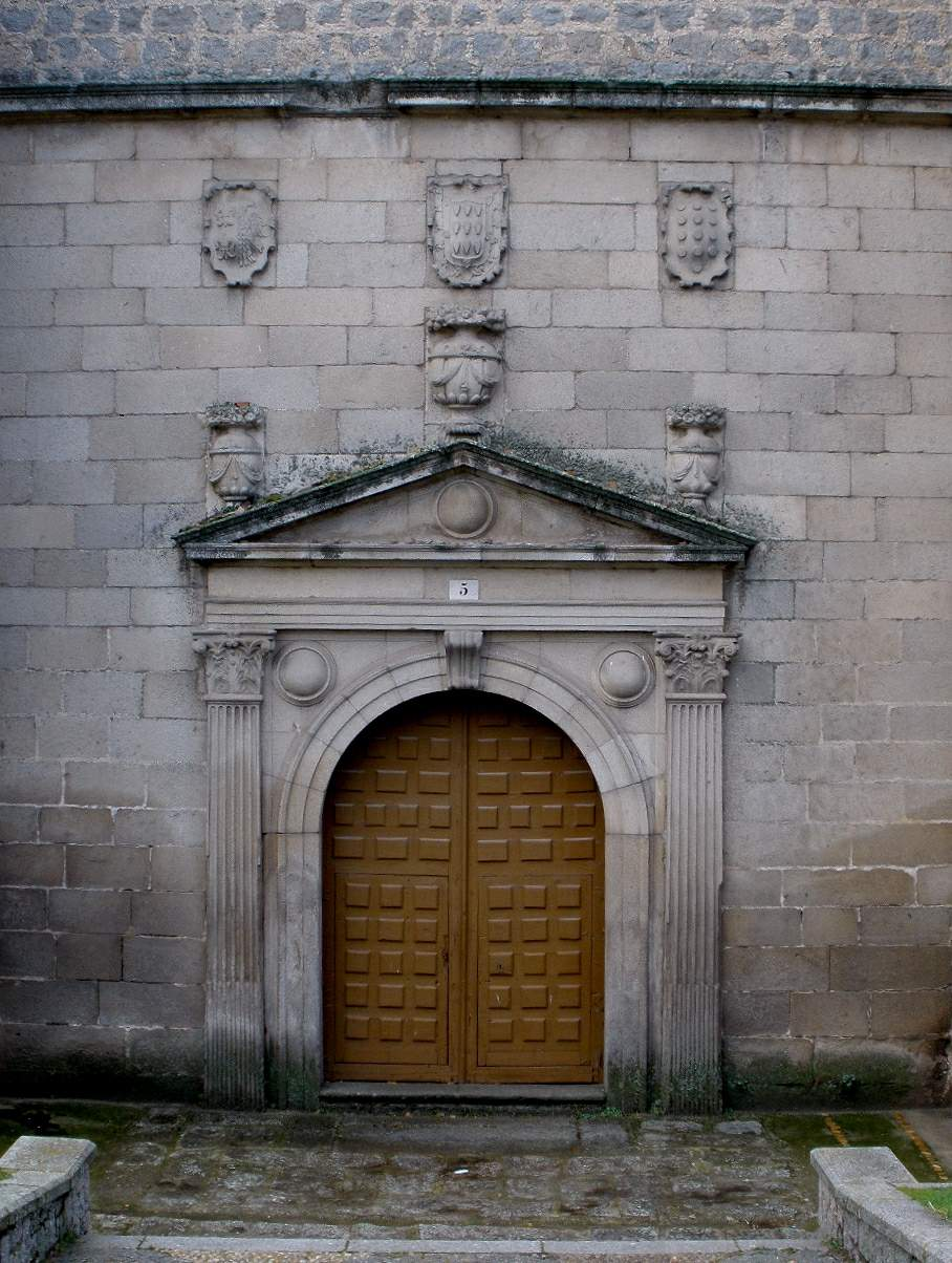 Avila - Iglesia de Santa Maria de Jesus (Ex Convento de las Gordillas)